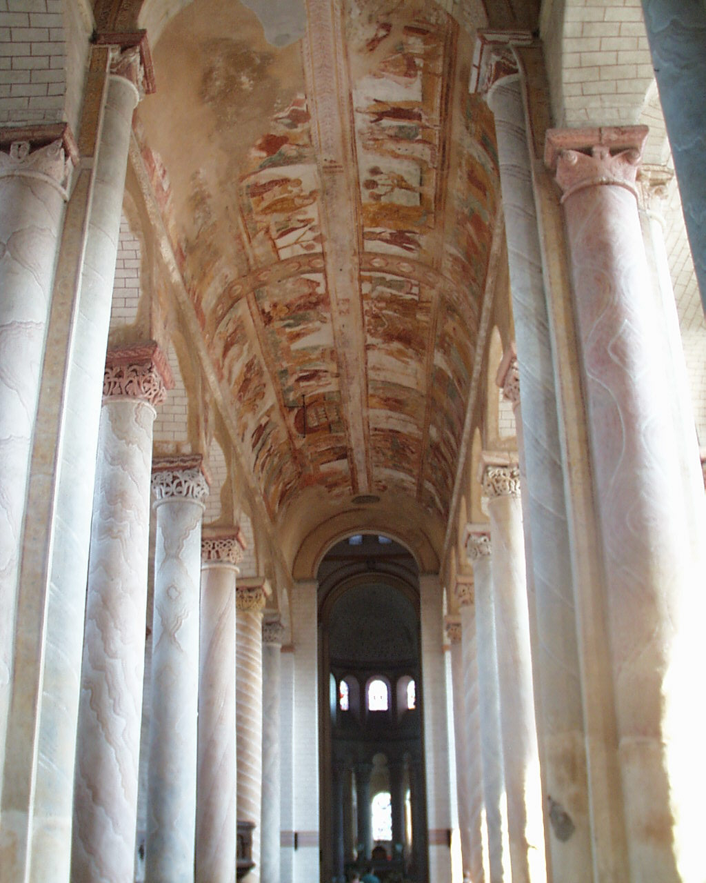 Vue de la nef de l'église abbatiale de Saint-Savin-sur-Gartempe Ceci est une photo personnelle de françoise Thurion prise en août fr:2001